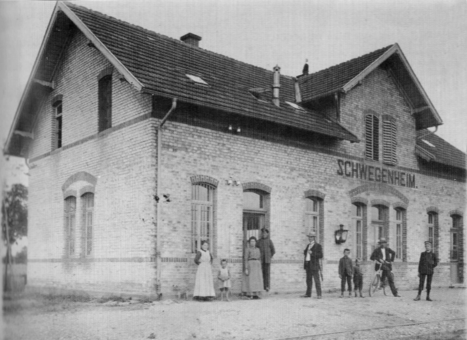 Bahnhof Schwegenheim im Jahr 1912